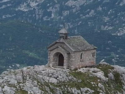 Dachsteinkapelle bei der Simonyhütte auf dem Dachsteingebirge, Oberösterreich, Österreich.